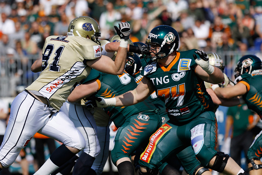 Hurricanes Offensive Tackle Nick Wieland against the Dresden Monarchs